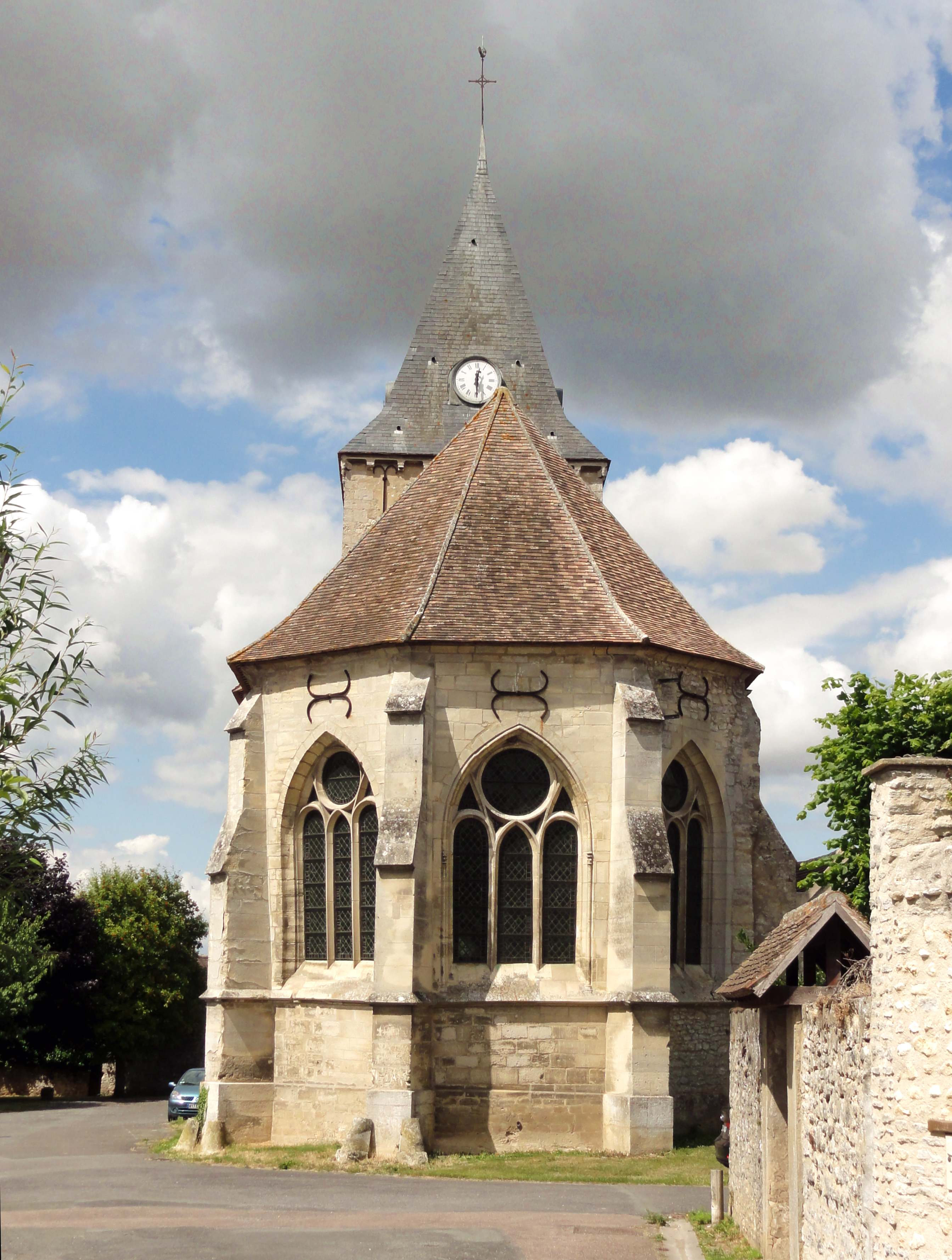 Église Saint-Martin d'Omerville (voir titre).